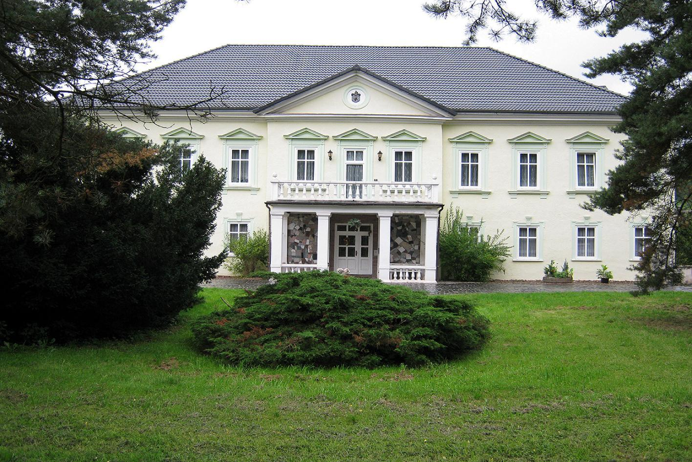 Das Marienthaler Schlösschen im Ortsteil Schweina der thüringischen Stadt Bad Liebenstein